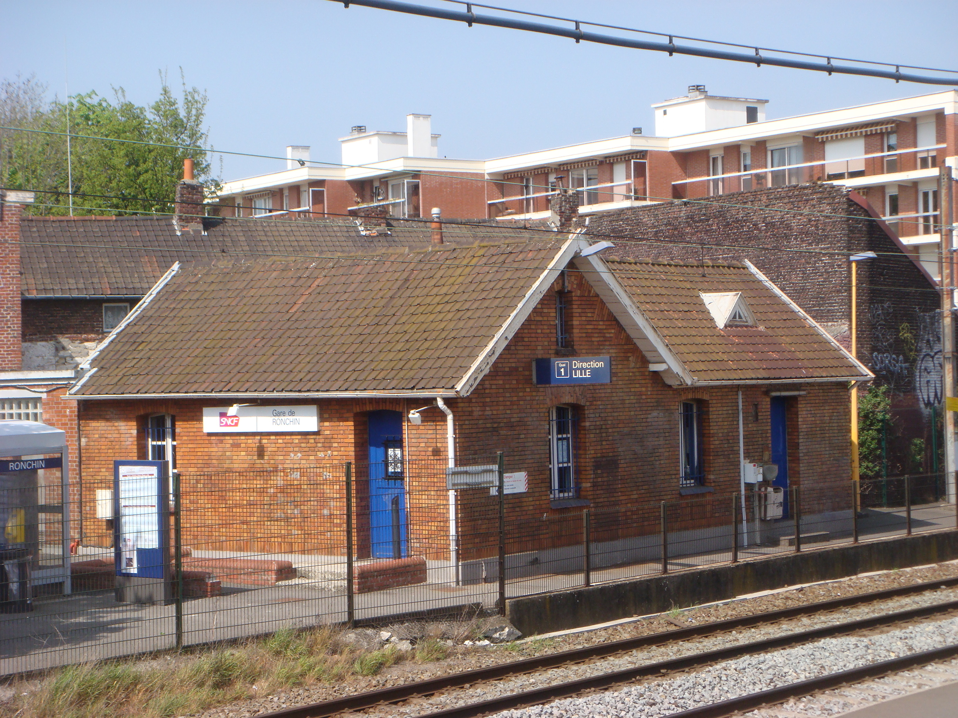 Gare de Ronchin - Nord